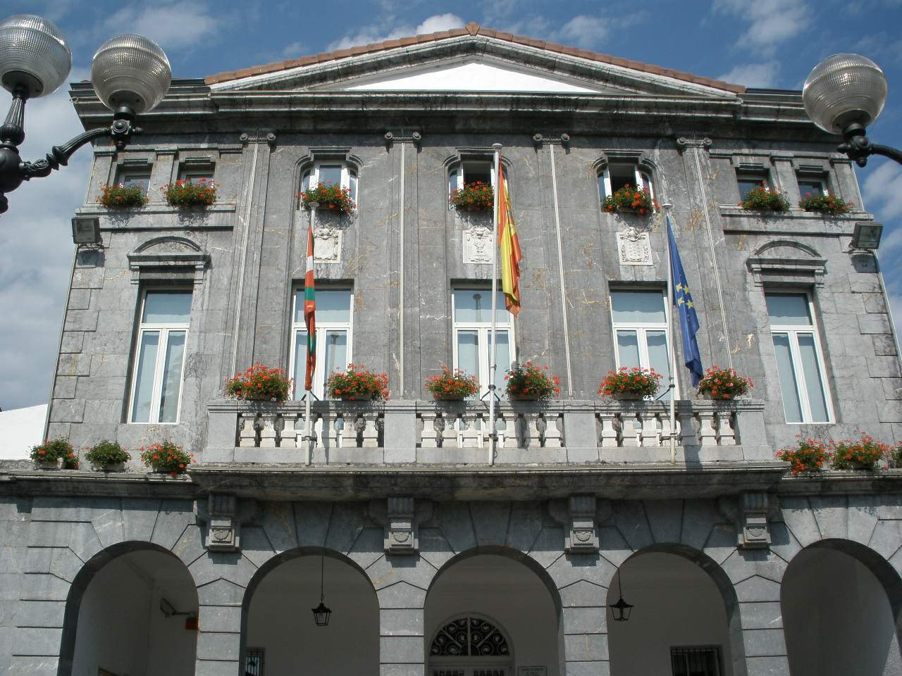 Ayuntamiento de Trapagaran (Bizkaia)